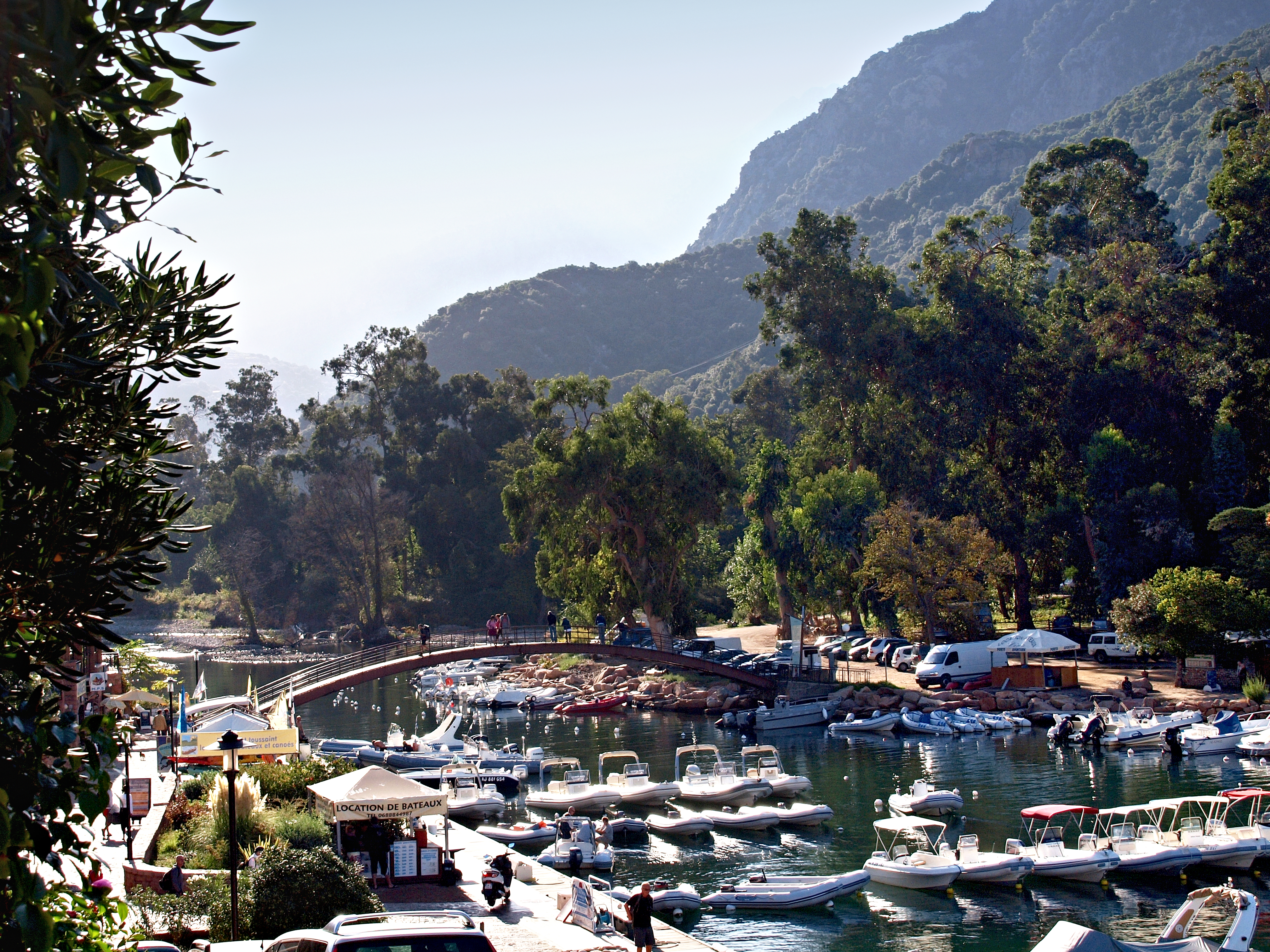 Ota (Corsica) - Passerelle de la marine de Porto